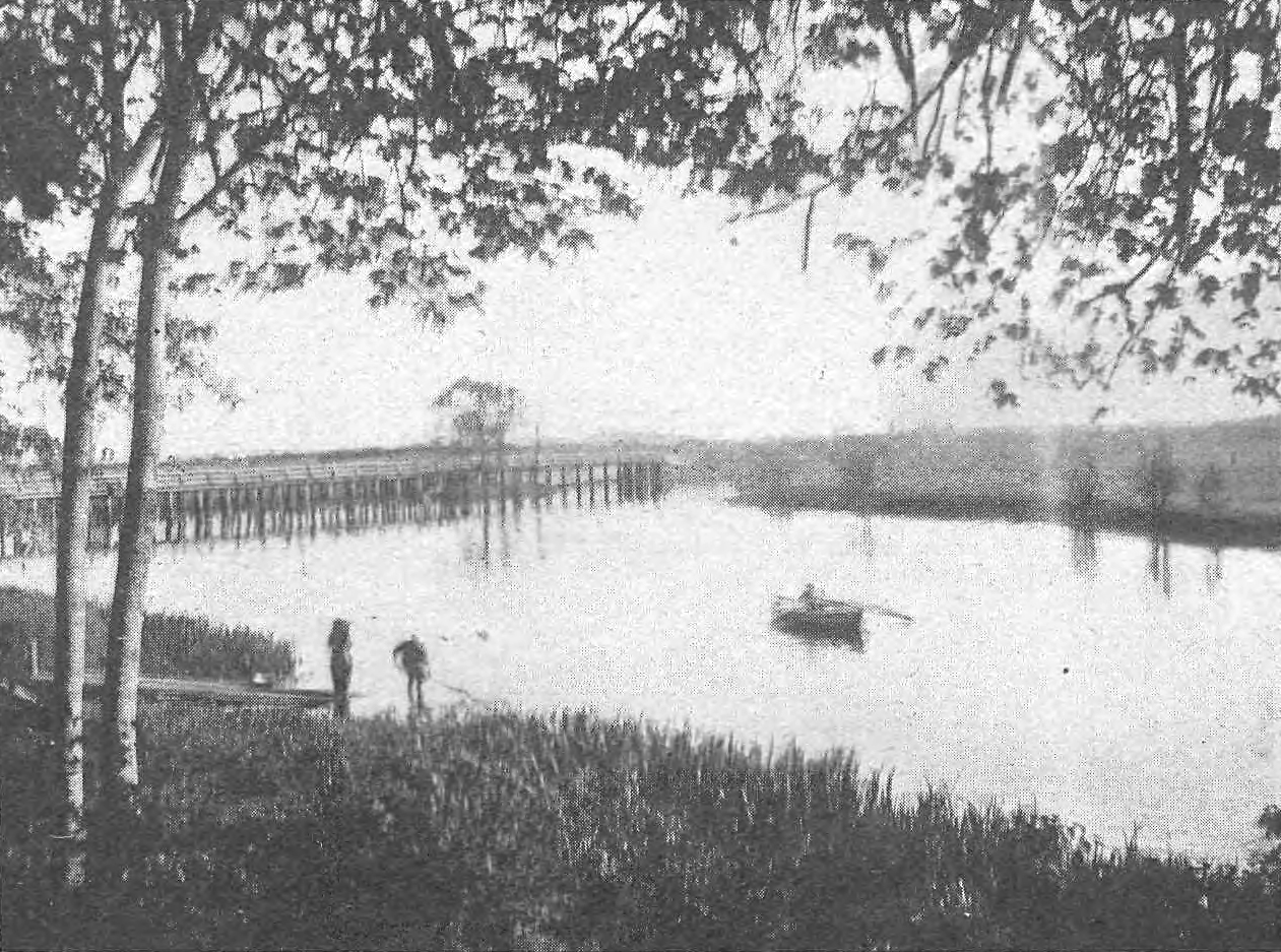 Беларуская (тарашкевіца): Русаковічы (Rusakovičy), сядзіба Вэйсэнгофаў і рака Пціч (Pcič)